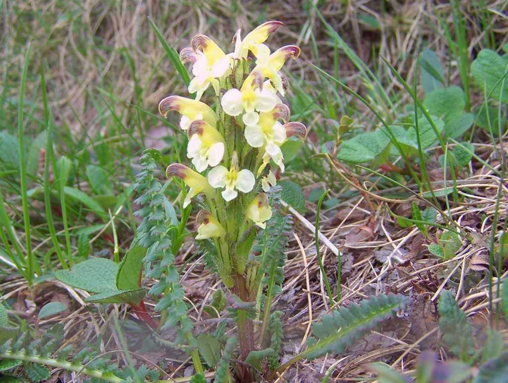 Pedicularis oederi (pl. gnidosz dwubarwny), habitat: Tatra Mountains